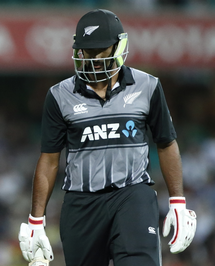 Ish Sodhi